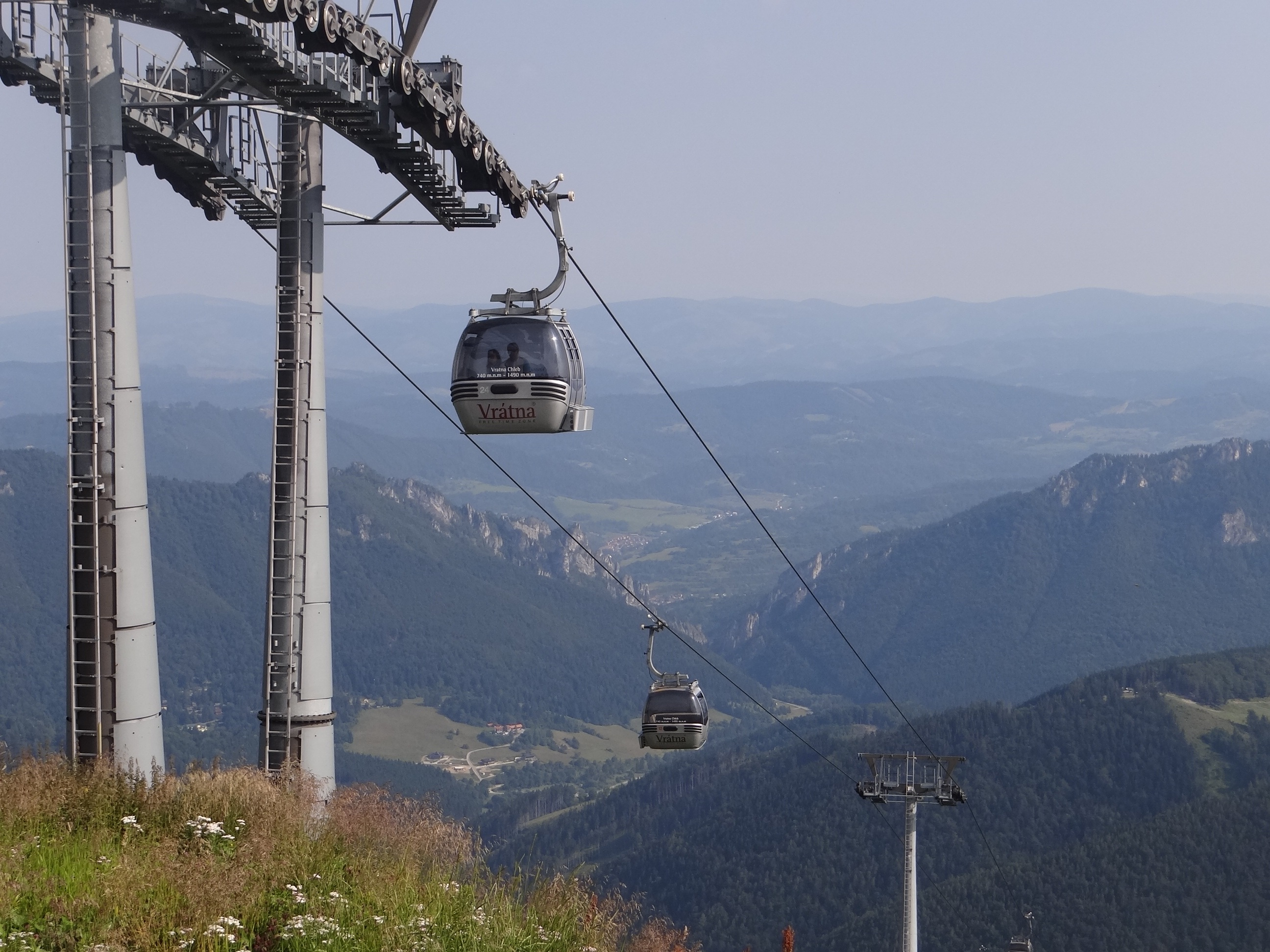 Lanovka Vrátna - Chleb